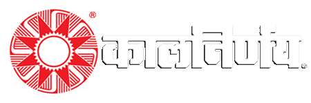 कालनिर्णय